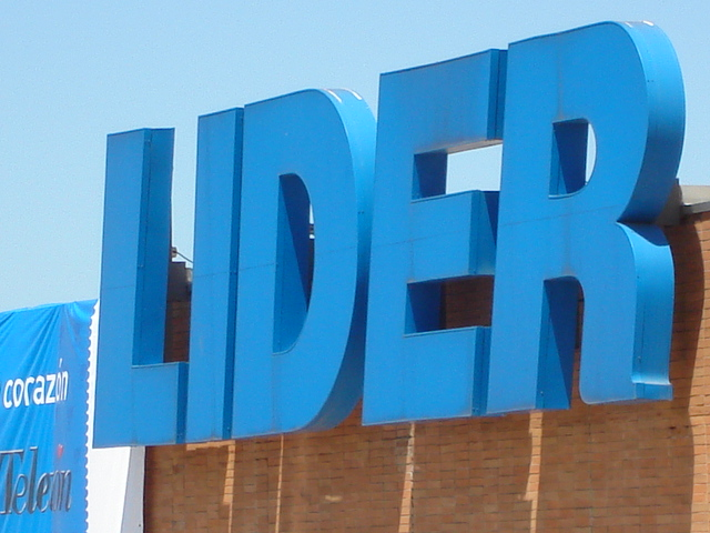 Logo Supermercado Líder de 9 Oriente 1241, Talca. Tomada por mí el 26 de noviembre de 2006.